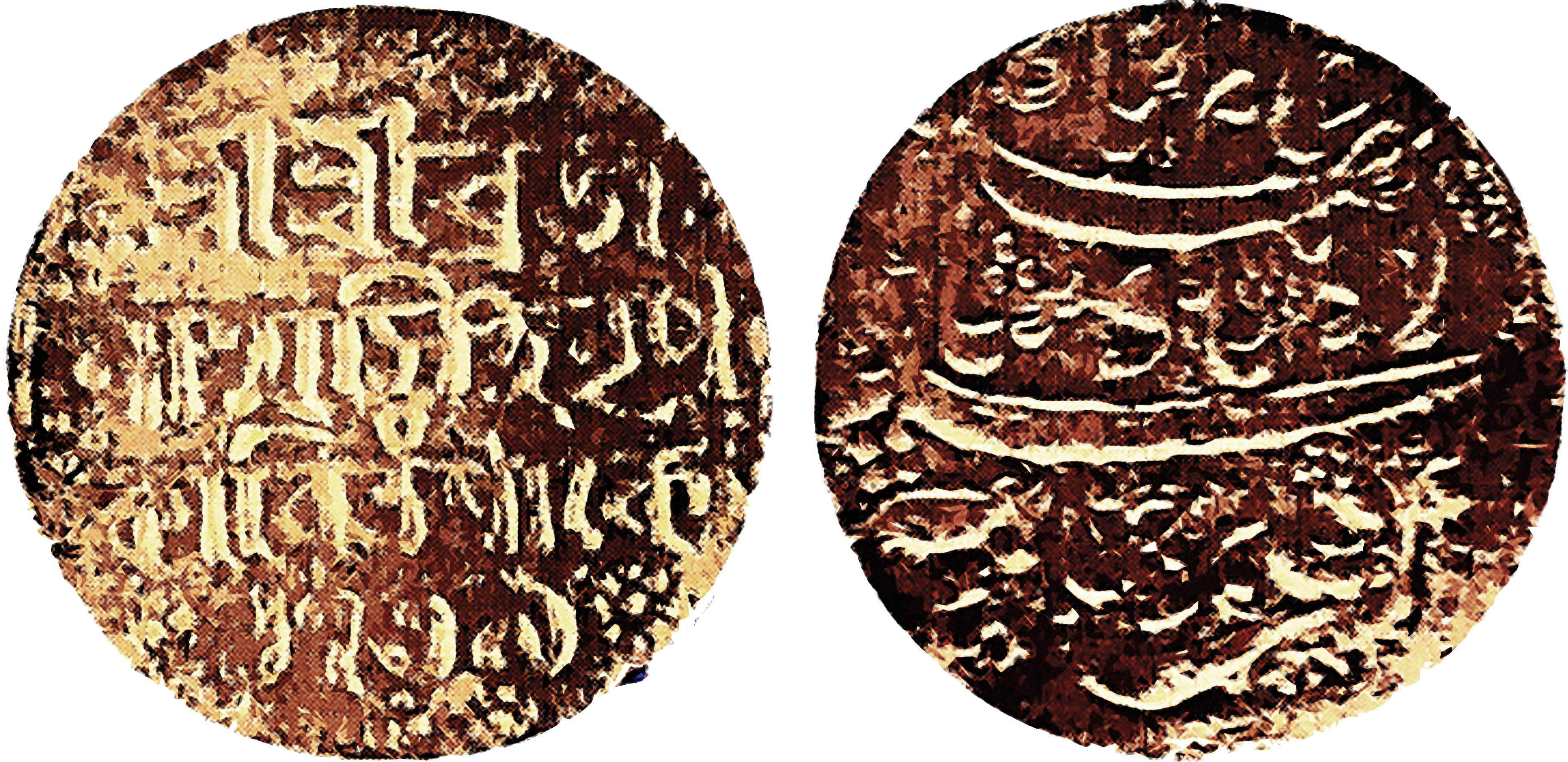 অসমীয়া: বজ্ৰনাথ সিংহৰ দুপোন মুদ্ৰা, ওজন এটোলা